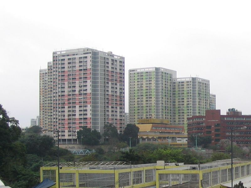 華富(二)邨 Wah Fu (II) Estate